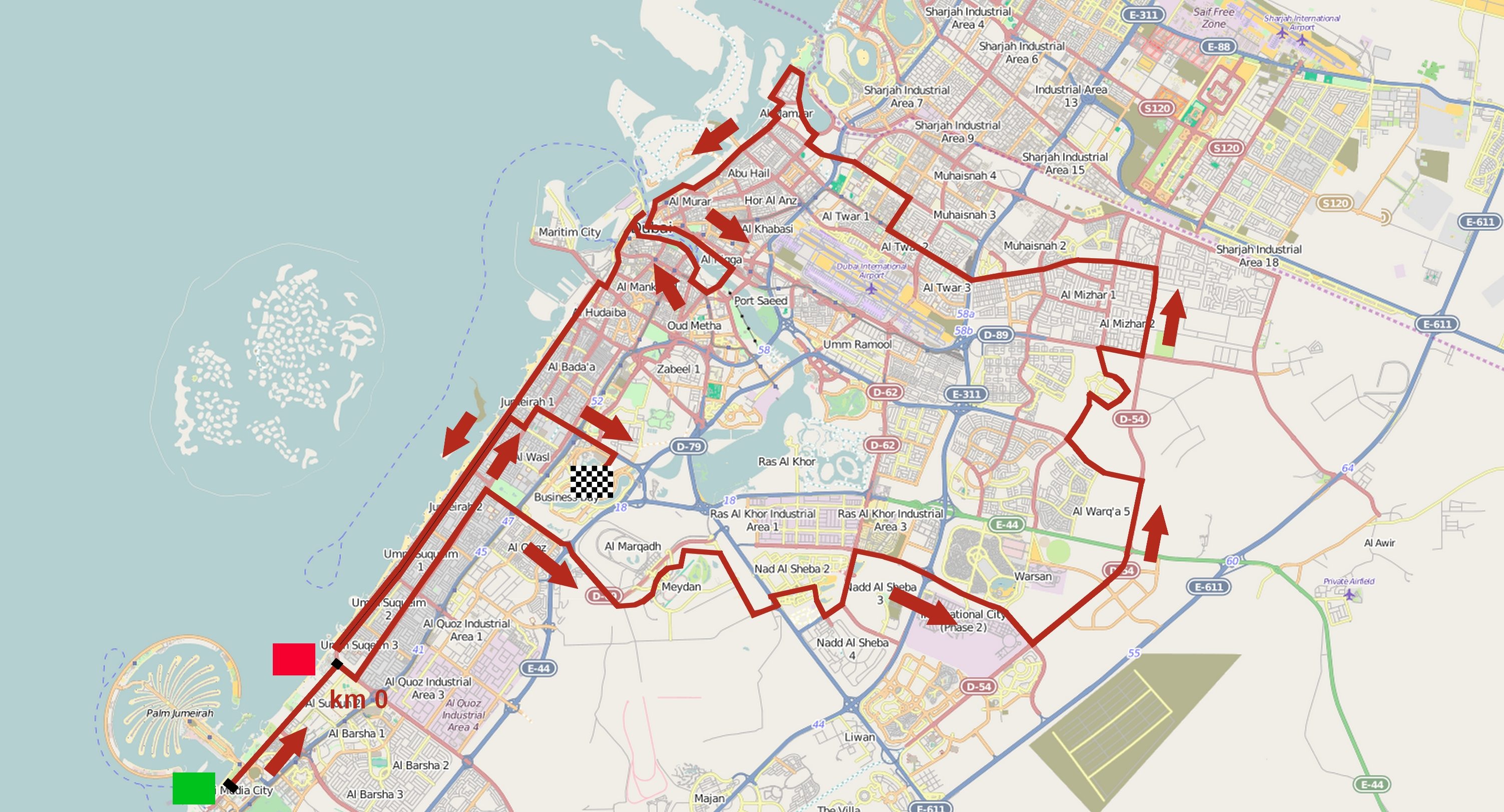 Parcours de la quatrième étape du Dubaï Tour 2015. This map may be incomplete, and may contain errors. Don't rely solely on it for navigation.